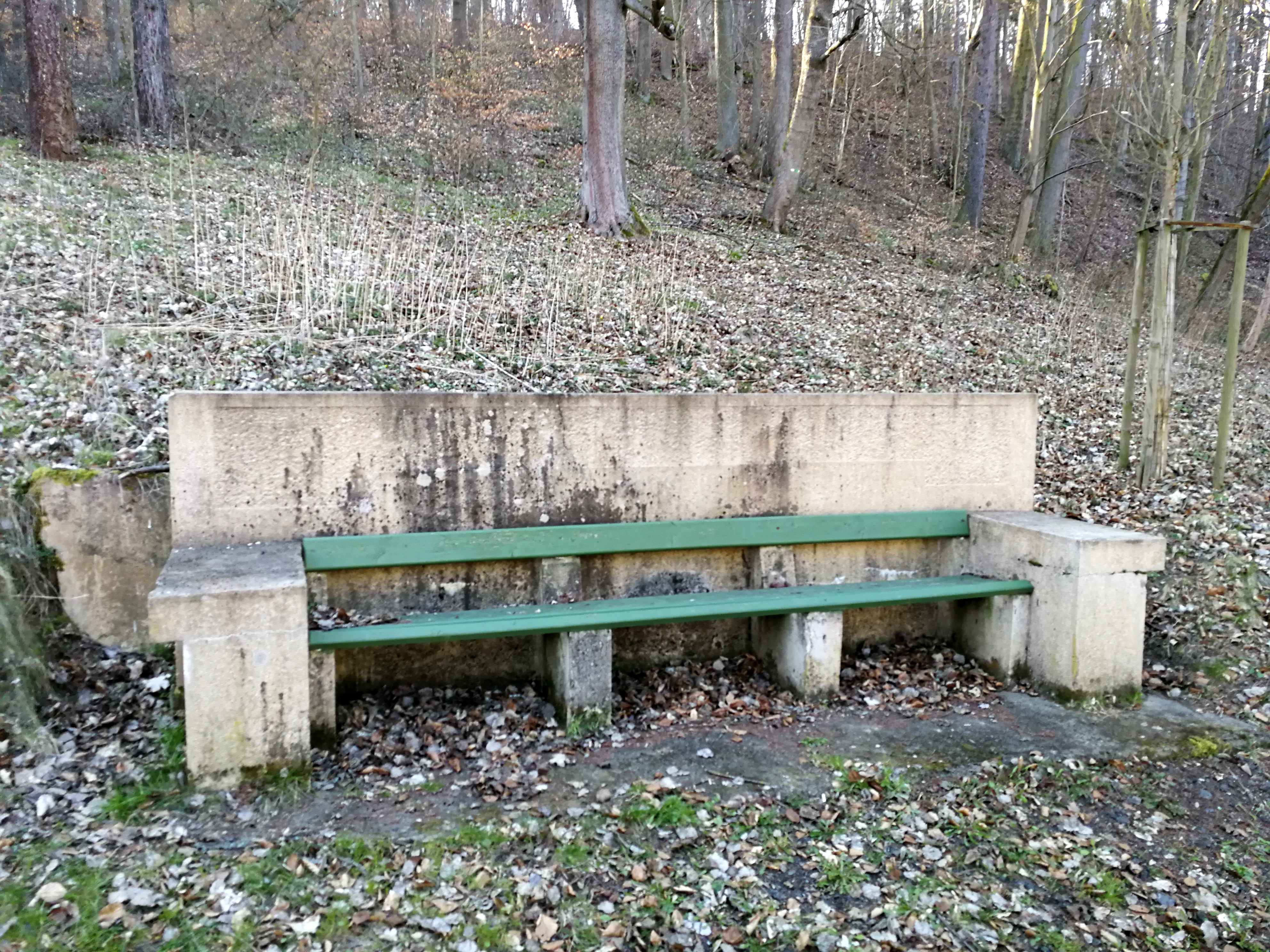 Lavička Allschlaraffia v Karlových Varech poblíž letního kina